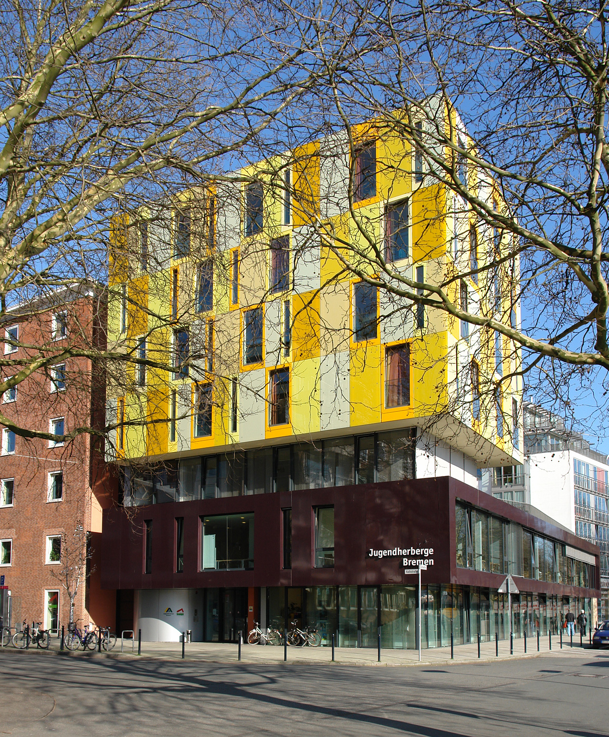 Jugendherberge Bremen, Kalkstr. 6/Ecke Schlachte